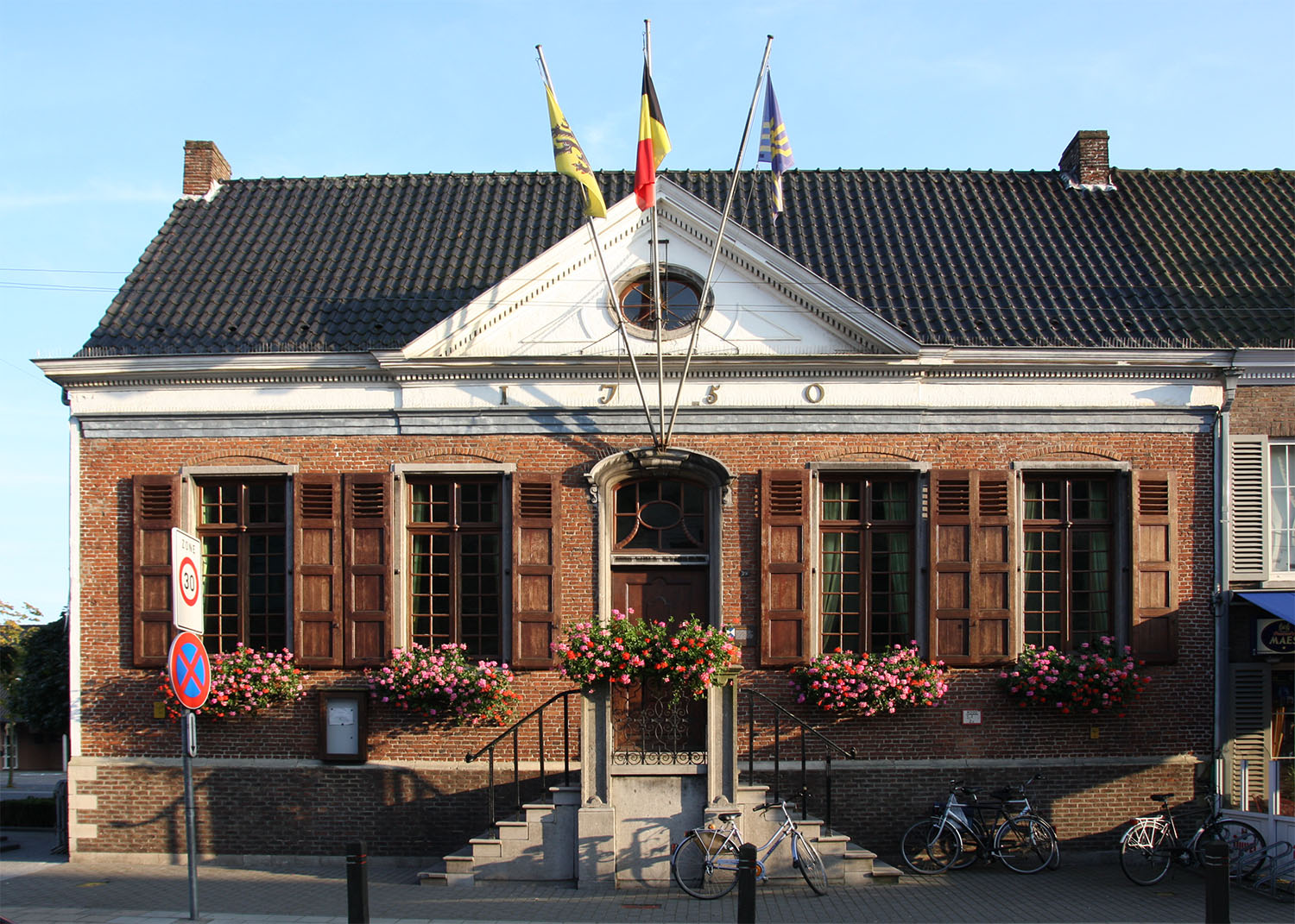 gemeentehuis in Kemzeke